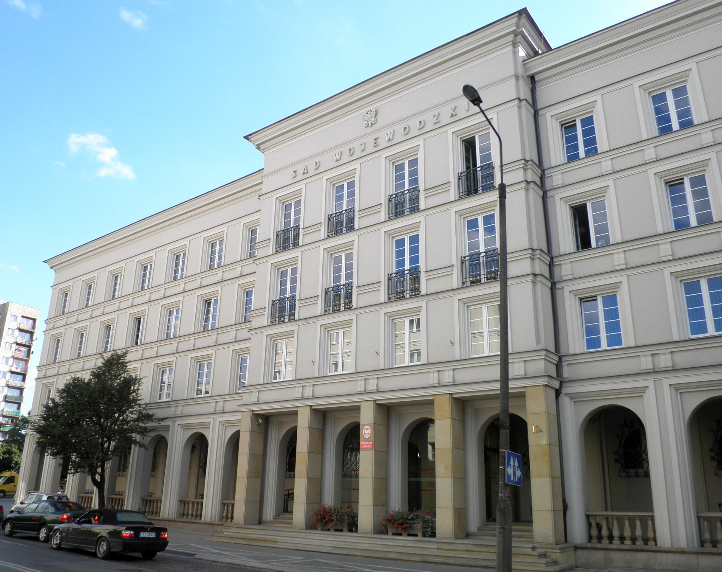 Sąd Wojewódzki przy ul. Seminaryjnej 12a w Kielcach